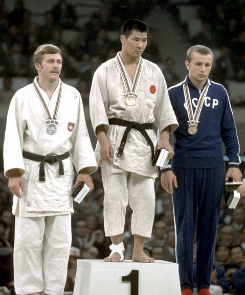 Eric Hänni, Takehide Nakatani, Oleg Stepanov, 1964 Olympics